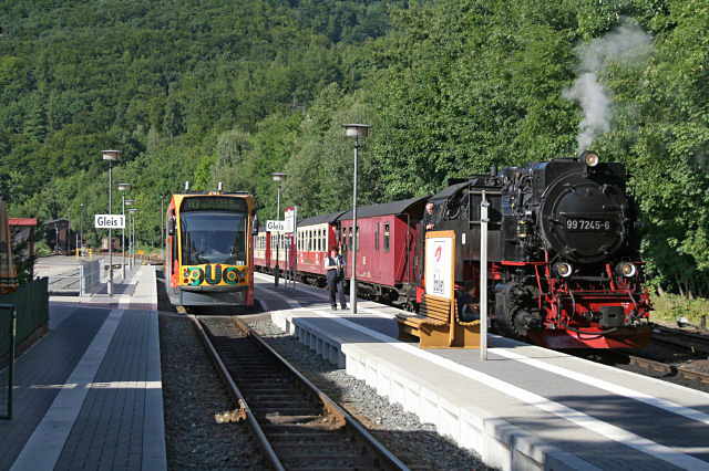 Zugkreuzung im Bahnhof Ilfeld